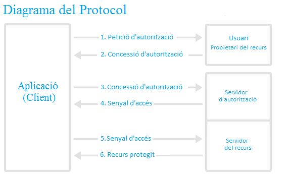 Imatge del protocol OAuth 2.0